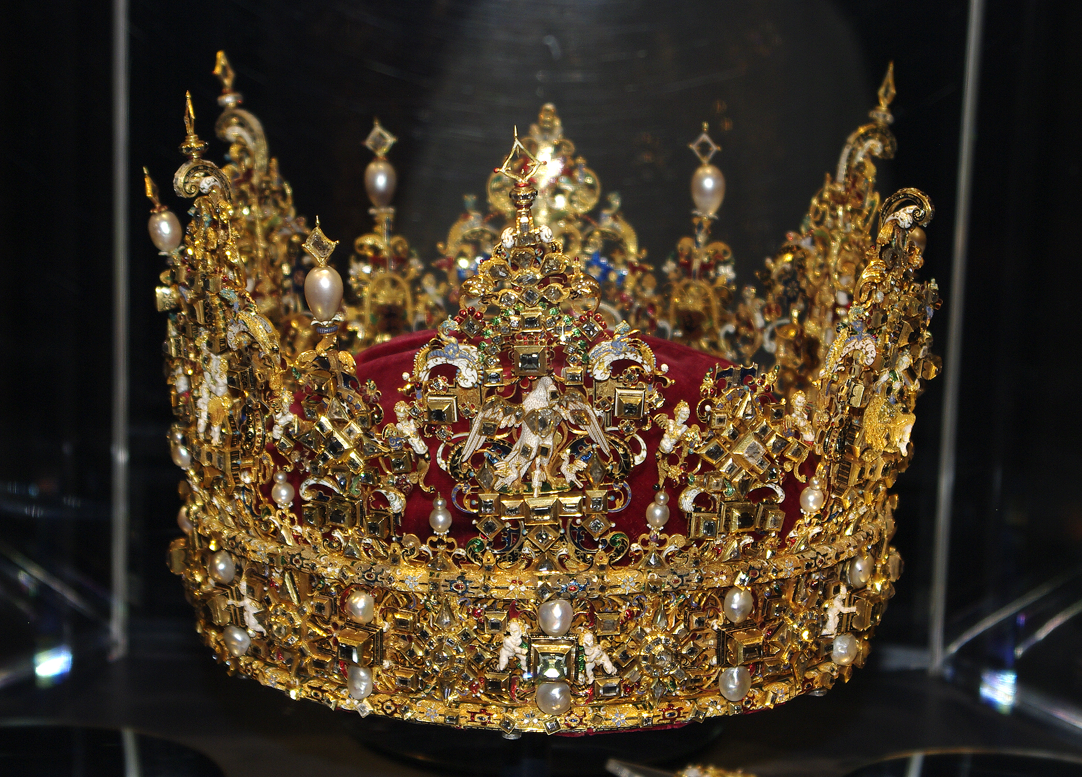 Christian IV's coronation crown from 1596.